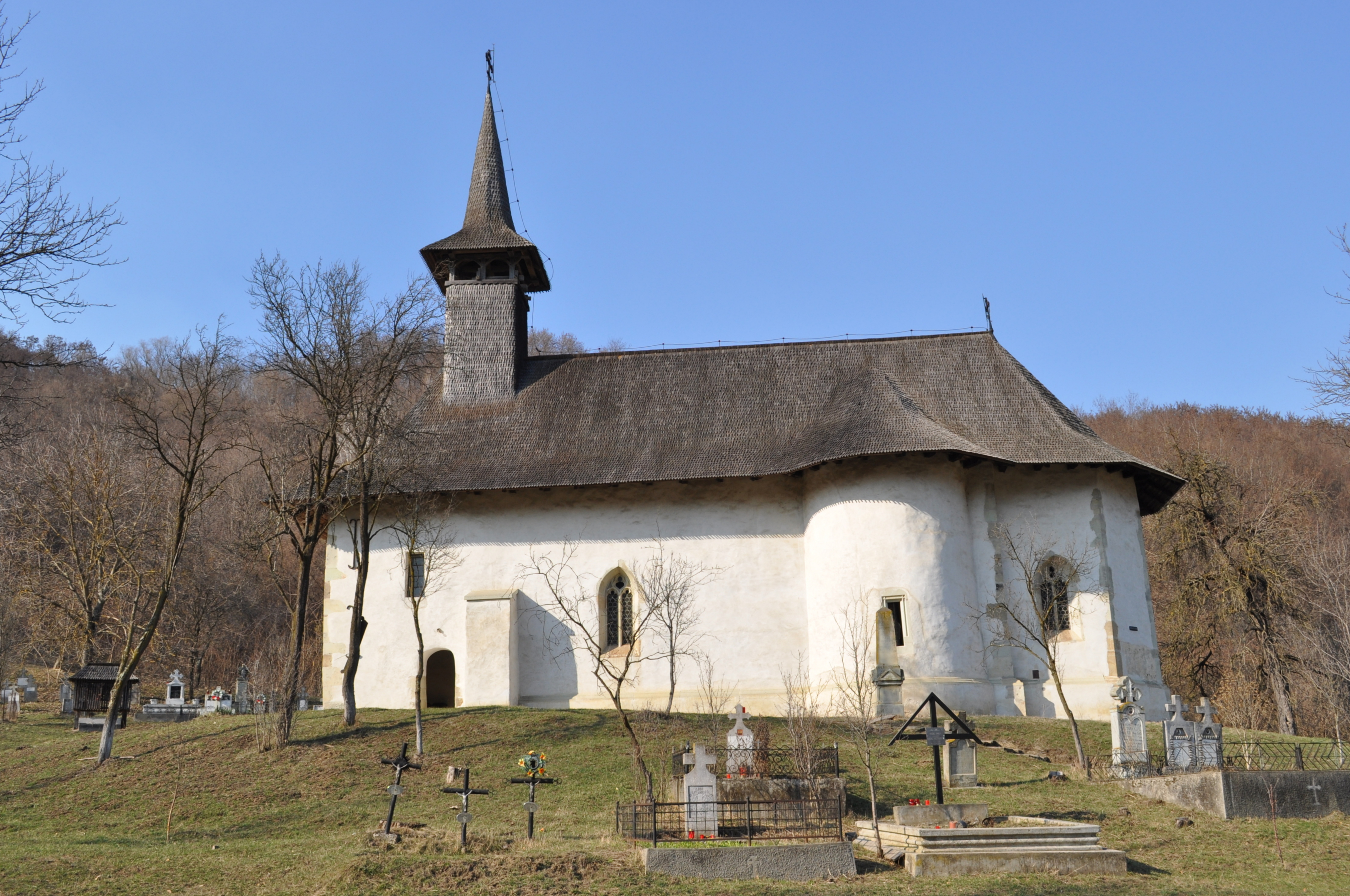 Biserica "Adormirea Maicii Domnului" a mănăstirii Vadului , sat Vad, județul Cluj